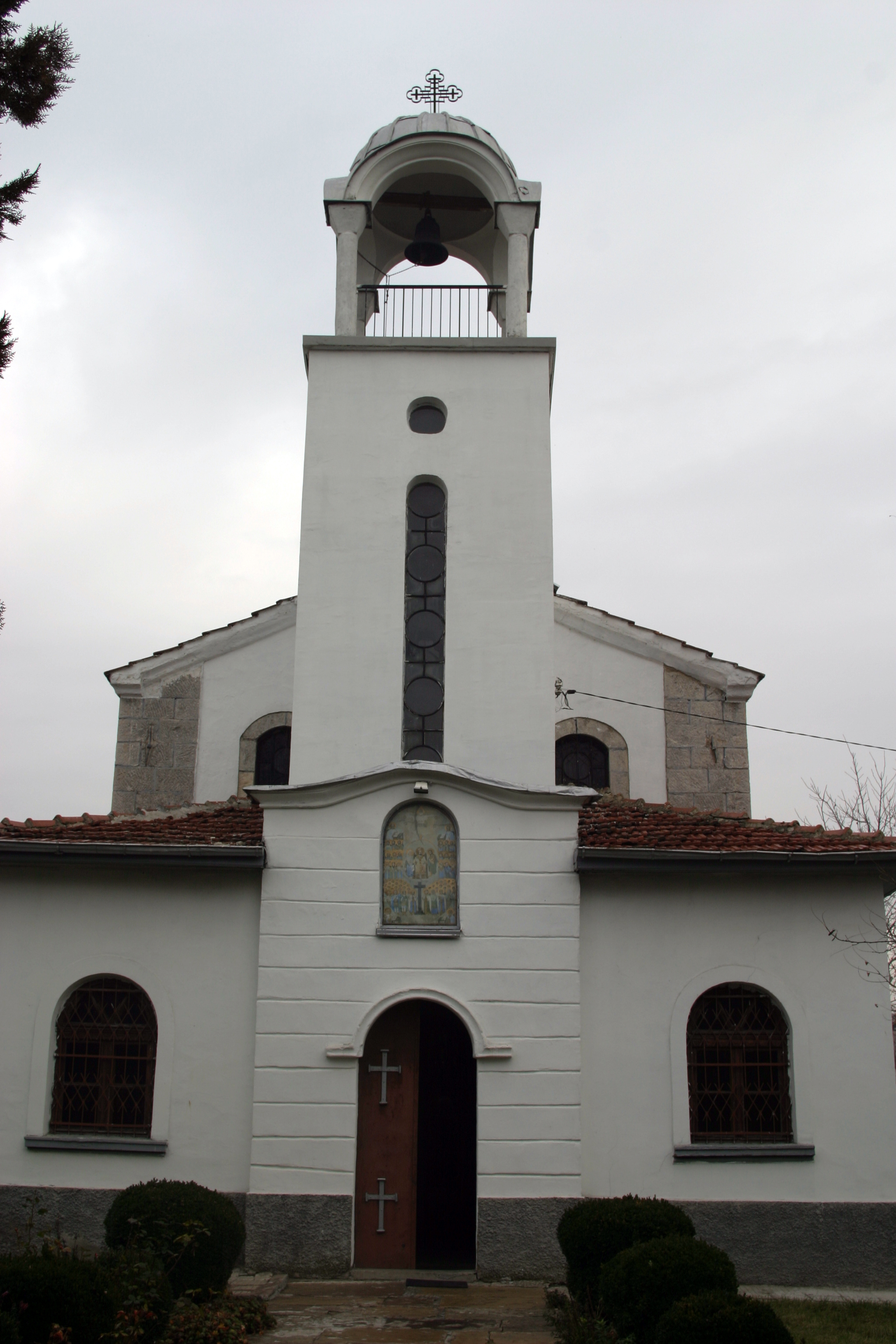 Църквата "Вси светии" в село Мрамор, Софийско.